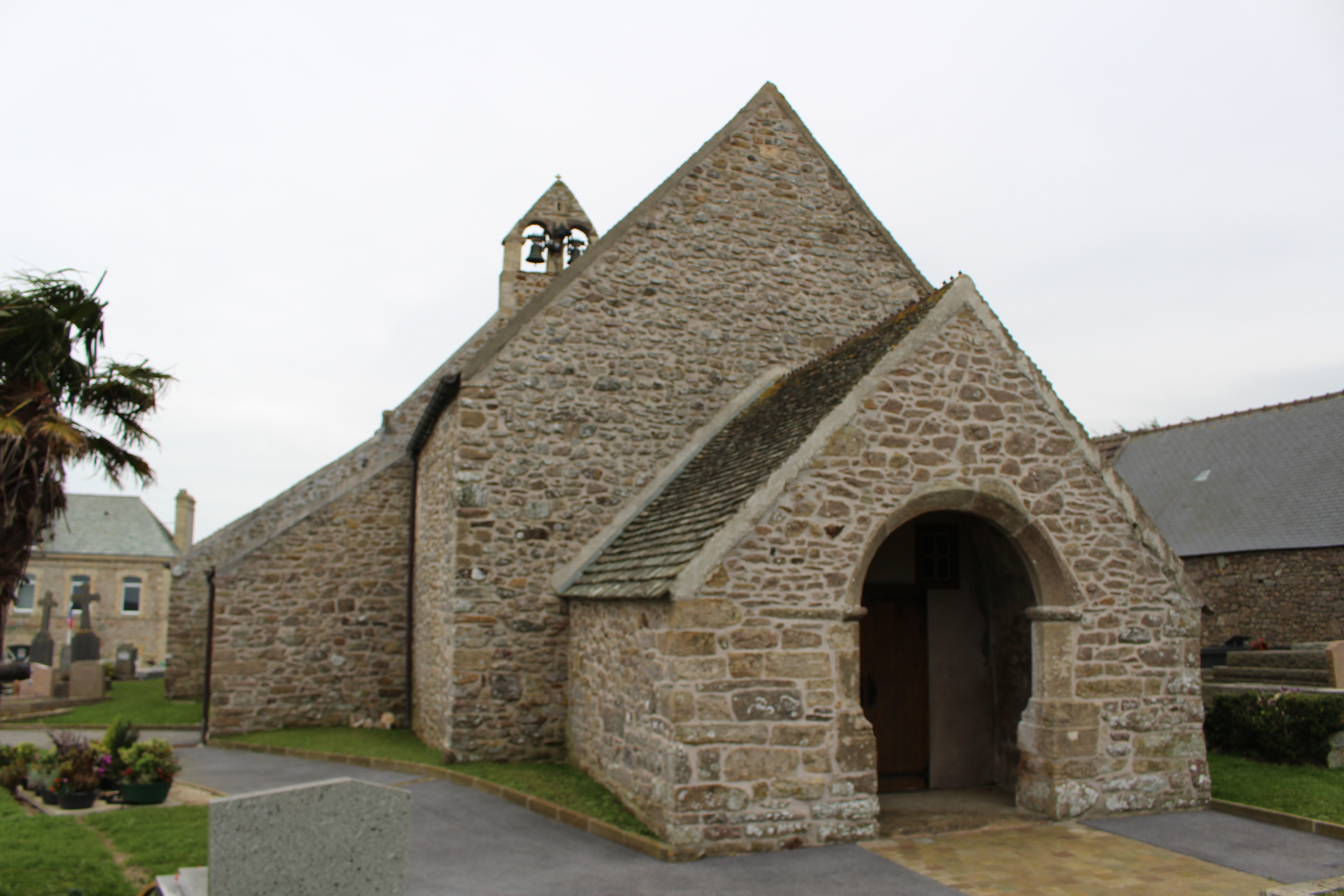 Église Saint-Gilles d'Auderville, Manche